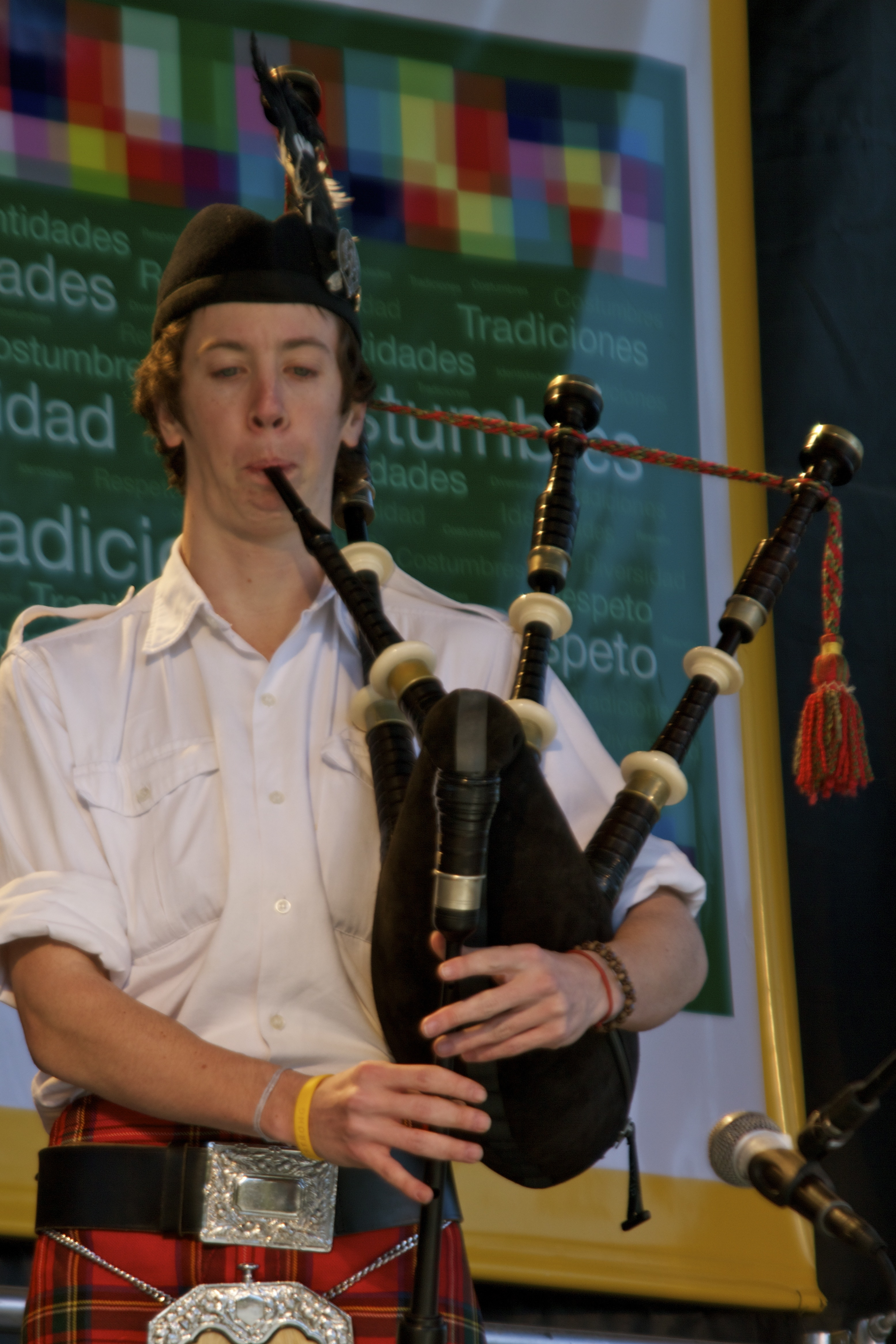 Dia del Inmigrante 2010 44